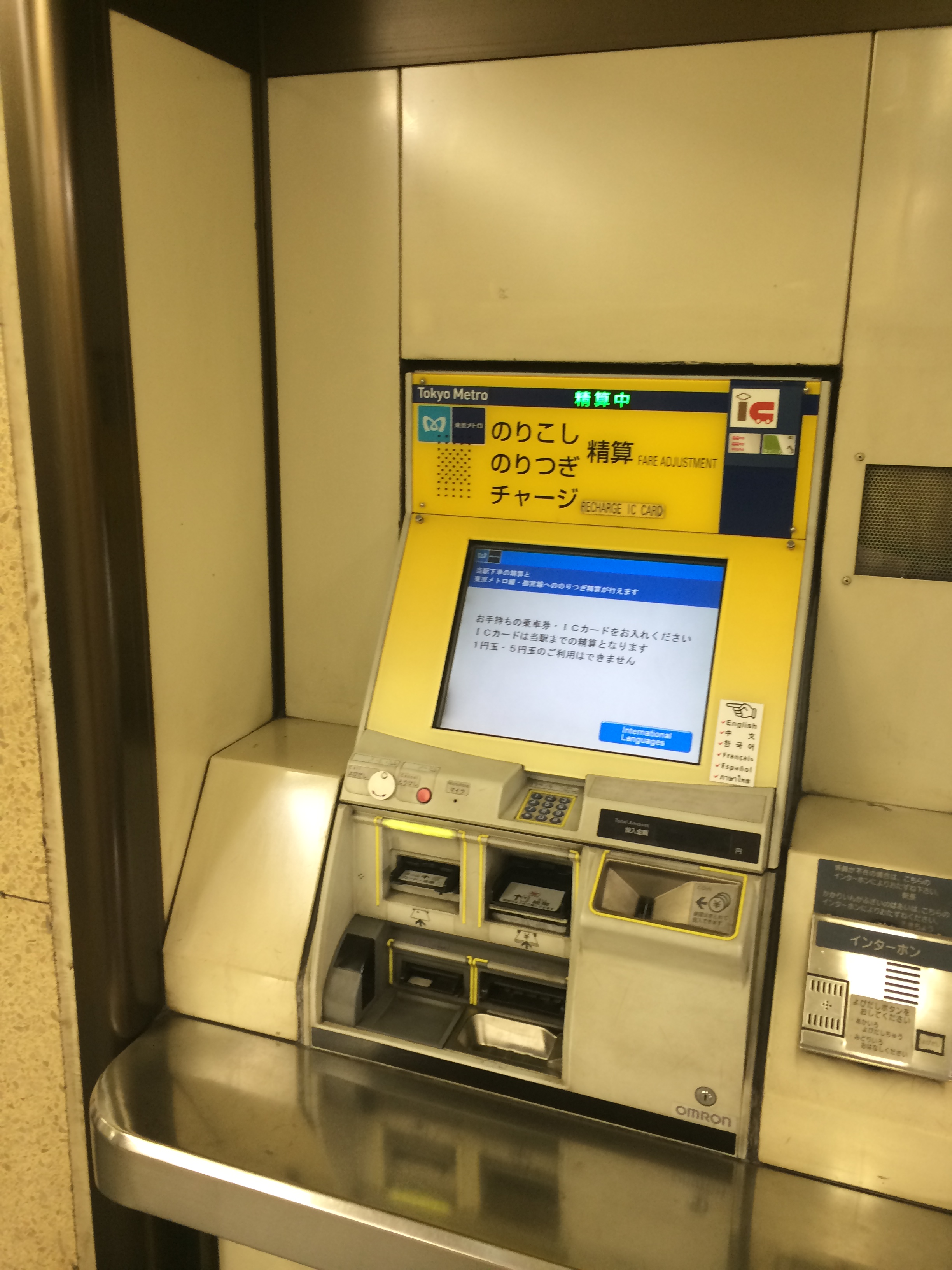 東京メトロ精算機